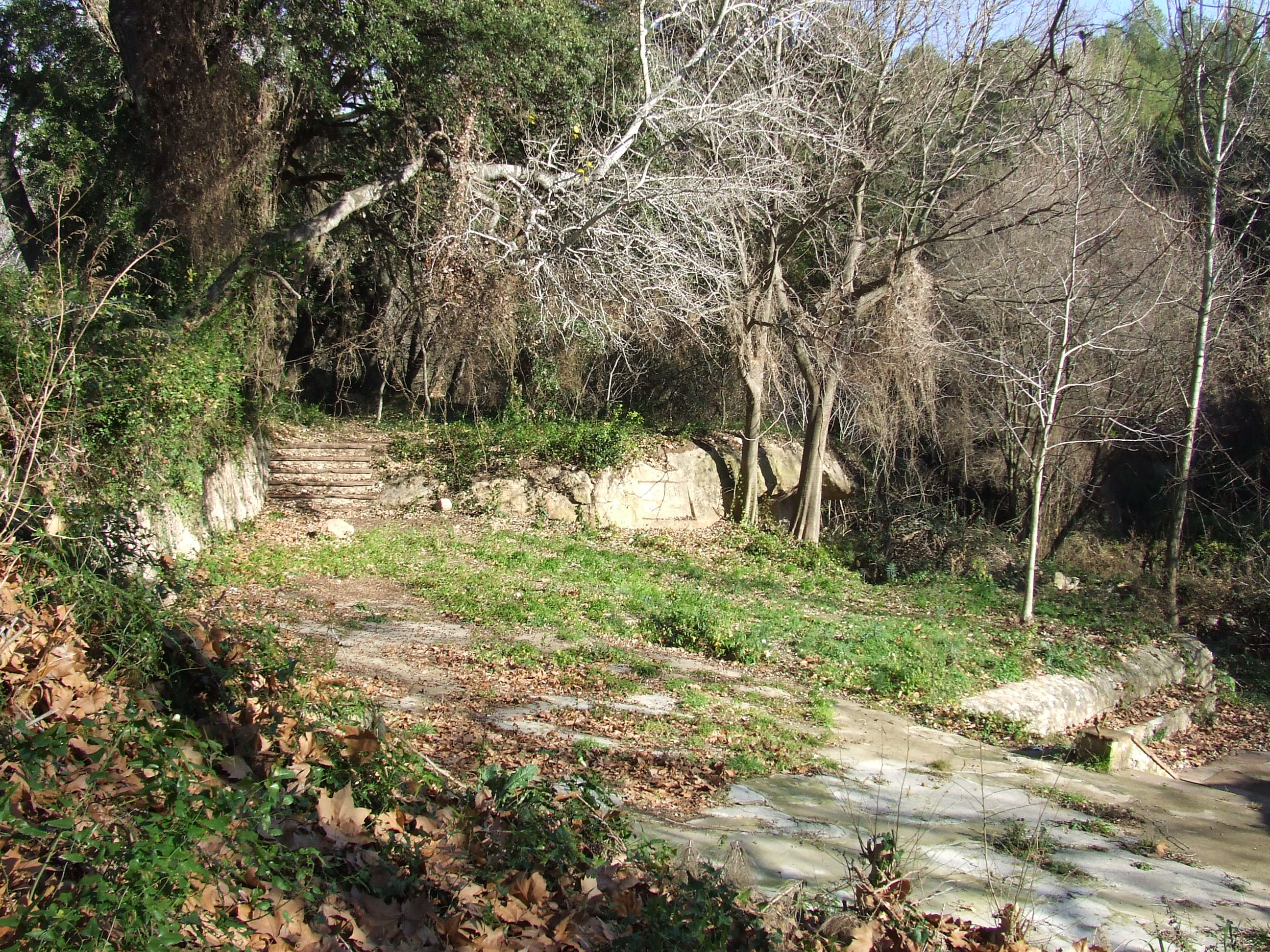 Parc de Can Noguera (Bigues, Bigues i Riells, Vallès Oriental)